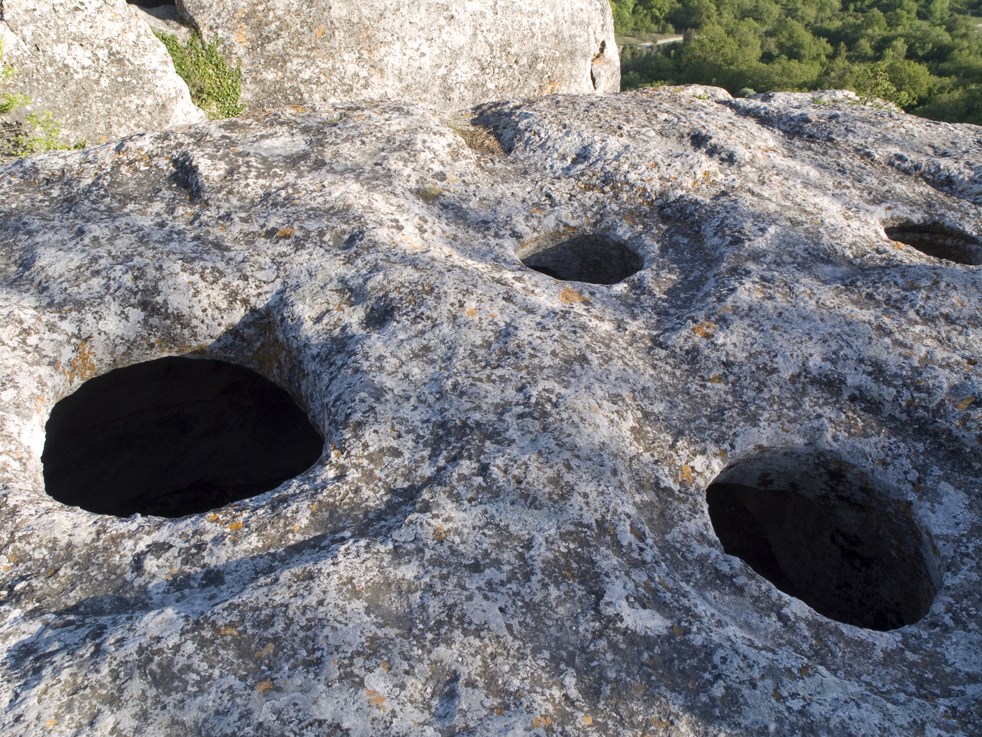 Крим - Ескі-Кермен